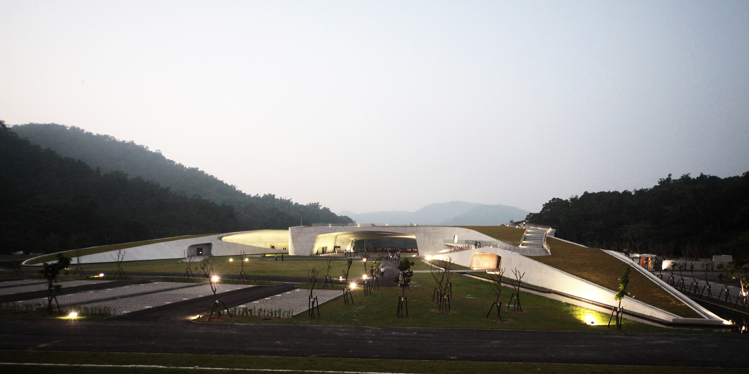 向山行政暨遊客中心照片，由作者楊恩達 Enta Yang授權使用‧